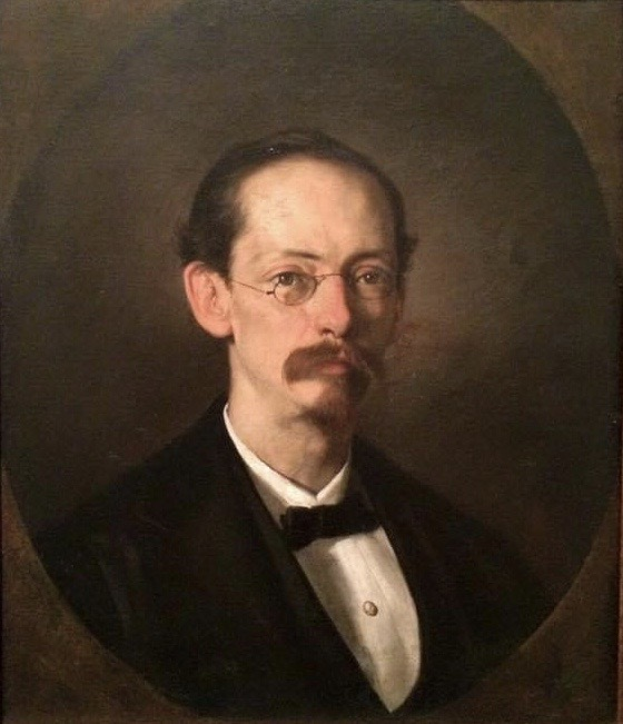 Retrato del poeta Rafael Pombo en su edad adulta